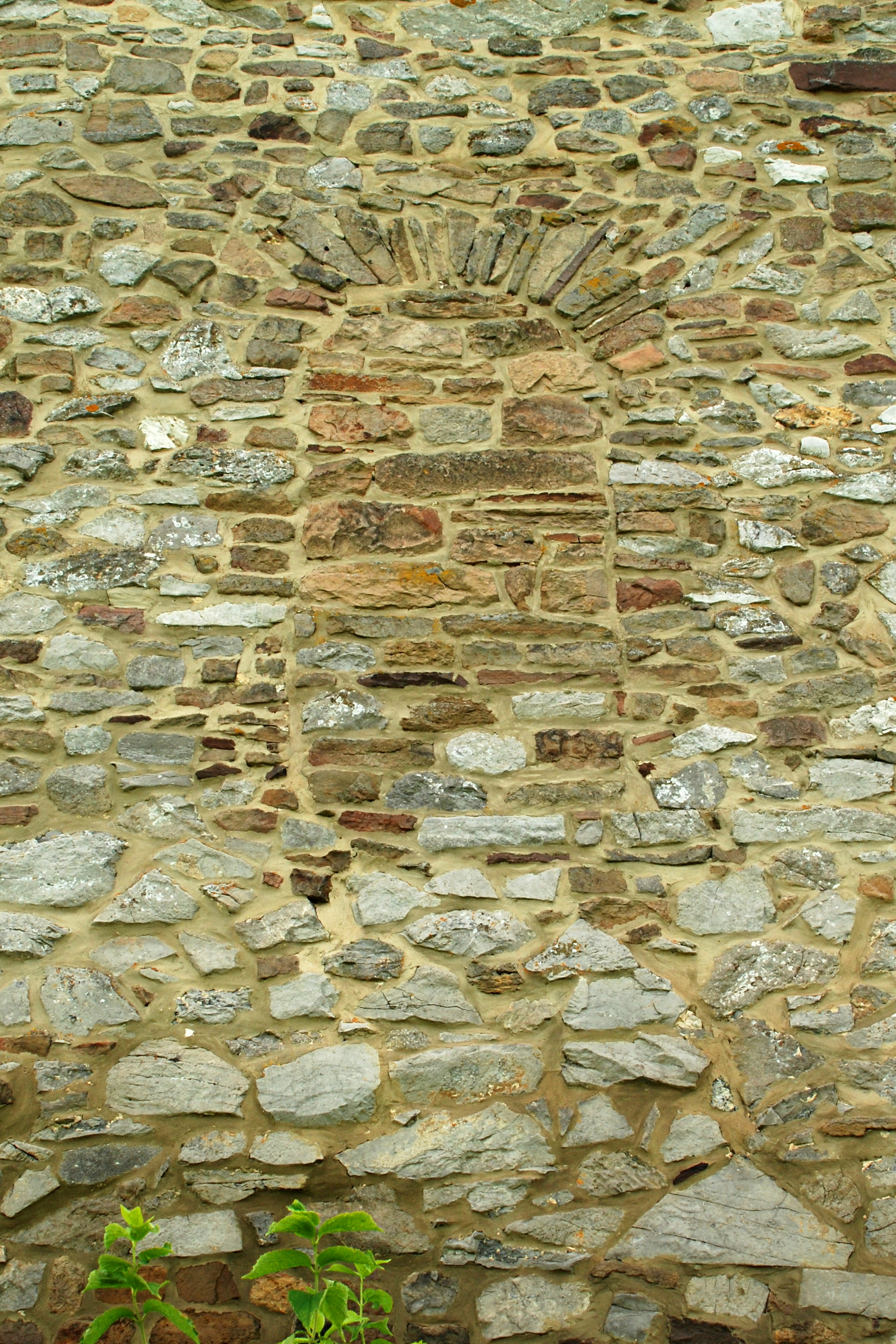 Belgique - Province de Namur - Maillen - Église Saint-Martin d'Ivoy